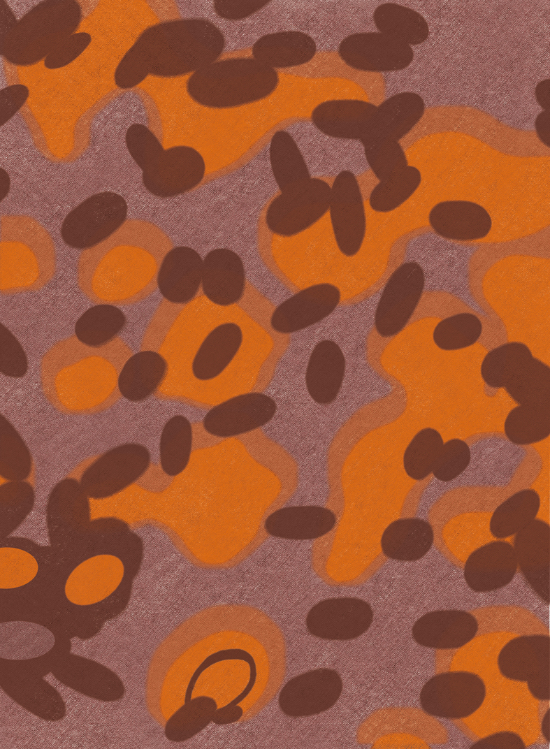 Platanenmuster der Waffen-SS – HerbstfarbeCropped caption:Platanenmuster – HerbstfarbeDas deutsche Platanenmuster ist das ältesteFlecktarn der Welt und wurde zwischen1937 bis 1942 hergestellt.